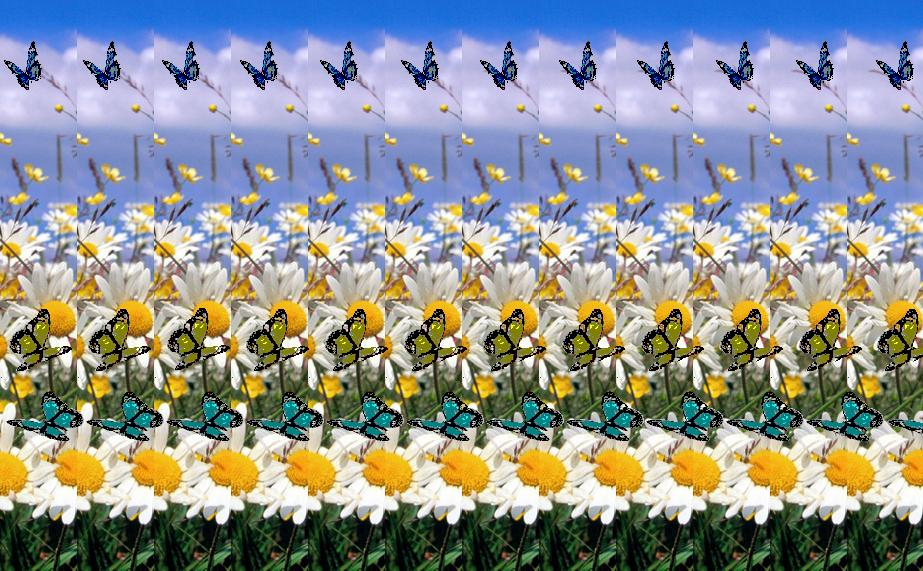 Autoesteroscopía